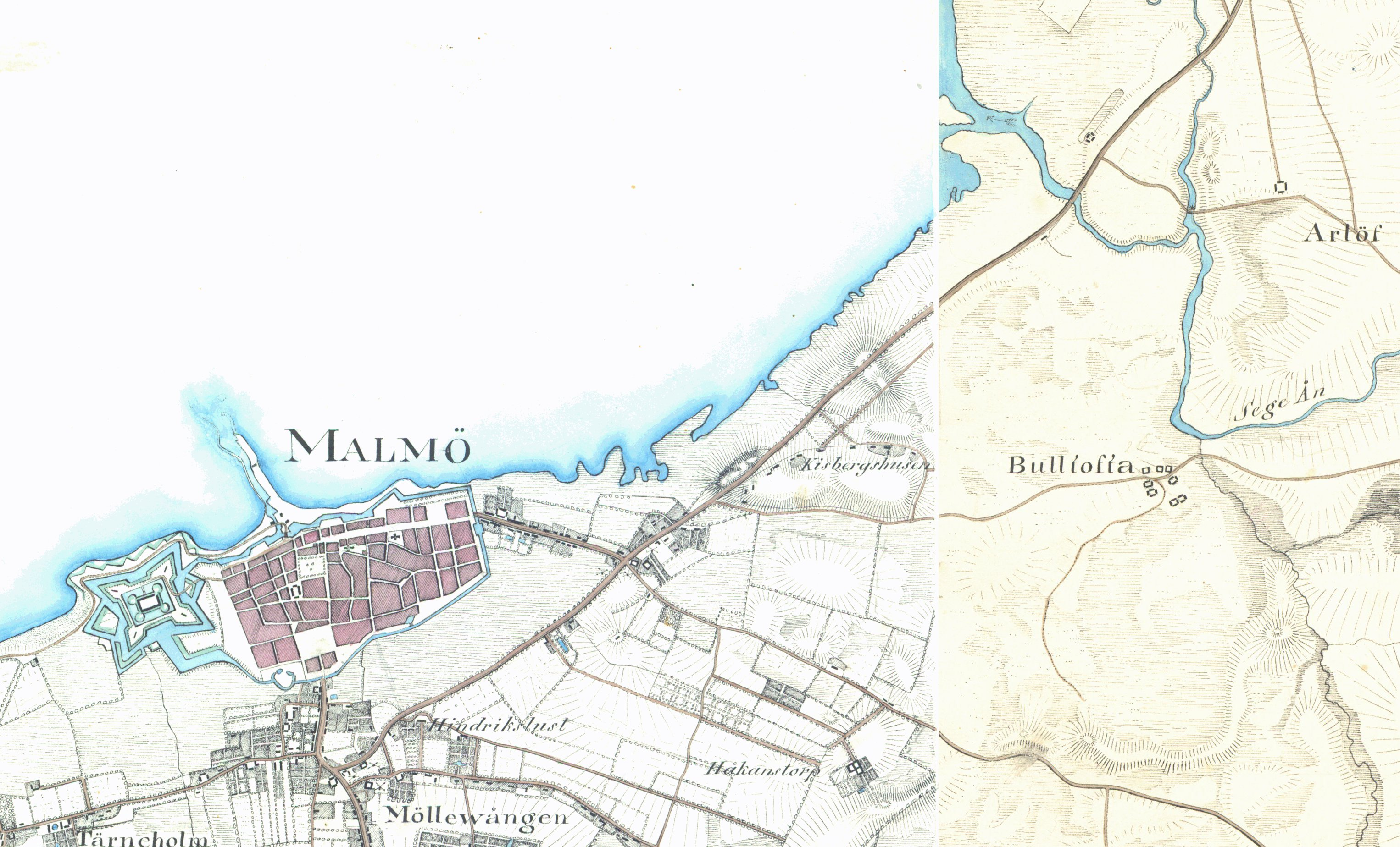 Montage av angränsande delar av Skånska rekognosceringskartan.